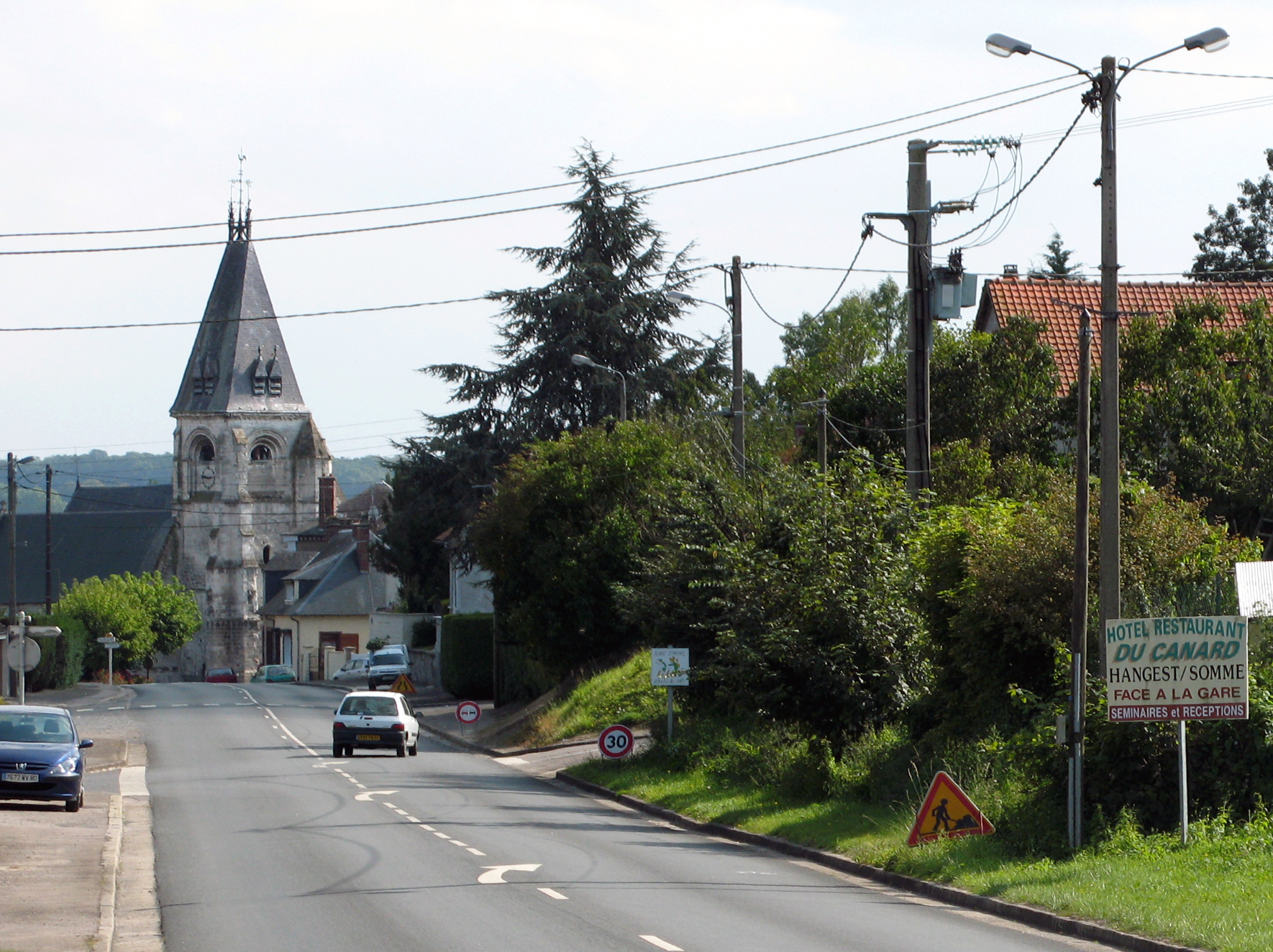 Hangest-sur-Somme (Somme, France) - L'entrée dans la commune, par l'Ouest, se fait par une route en pente. .